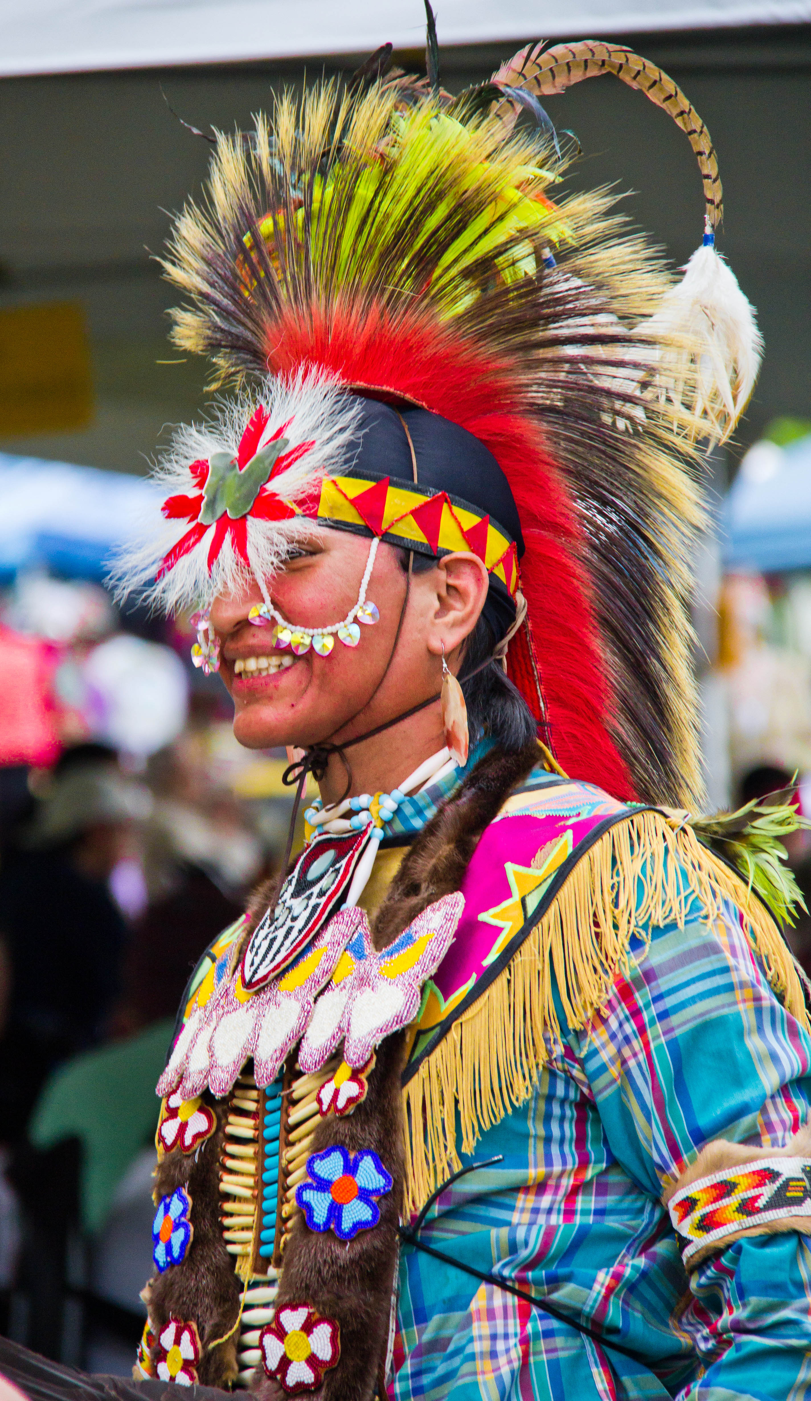 Odawa Native Pow Wow 2014